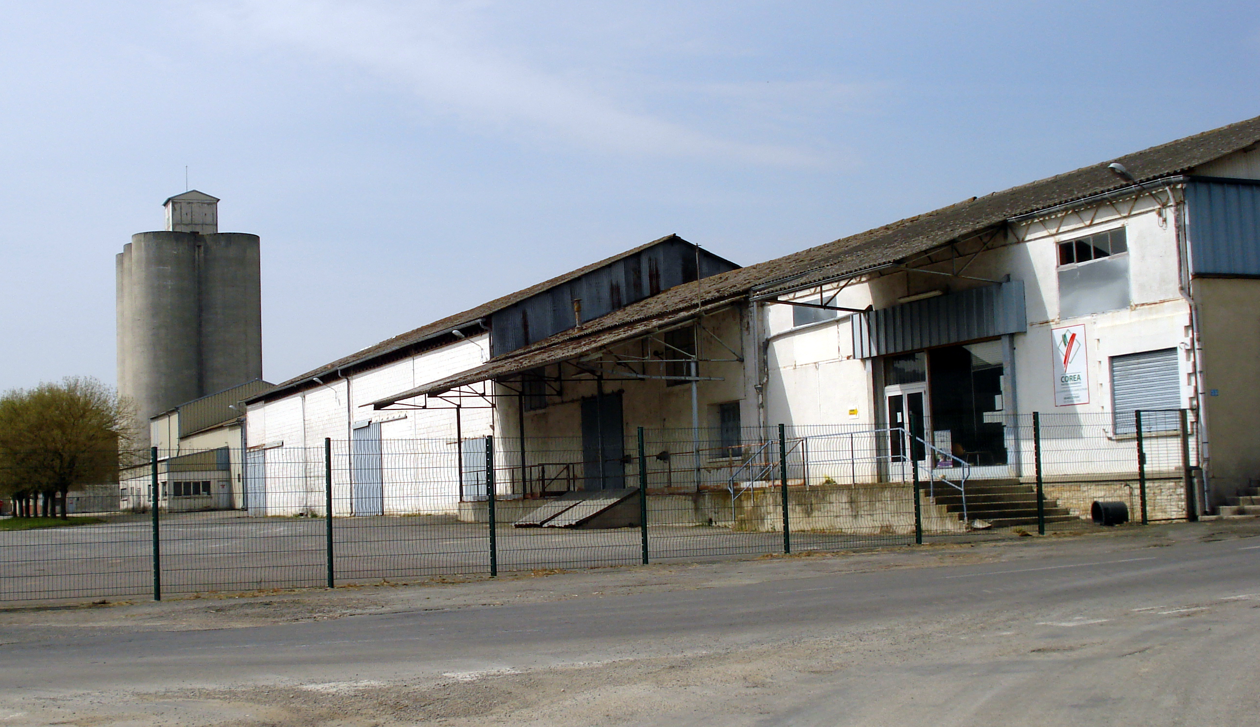 La coopérative de Chives